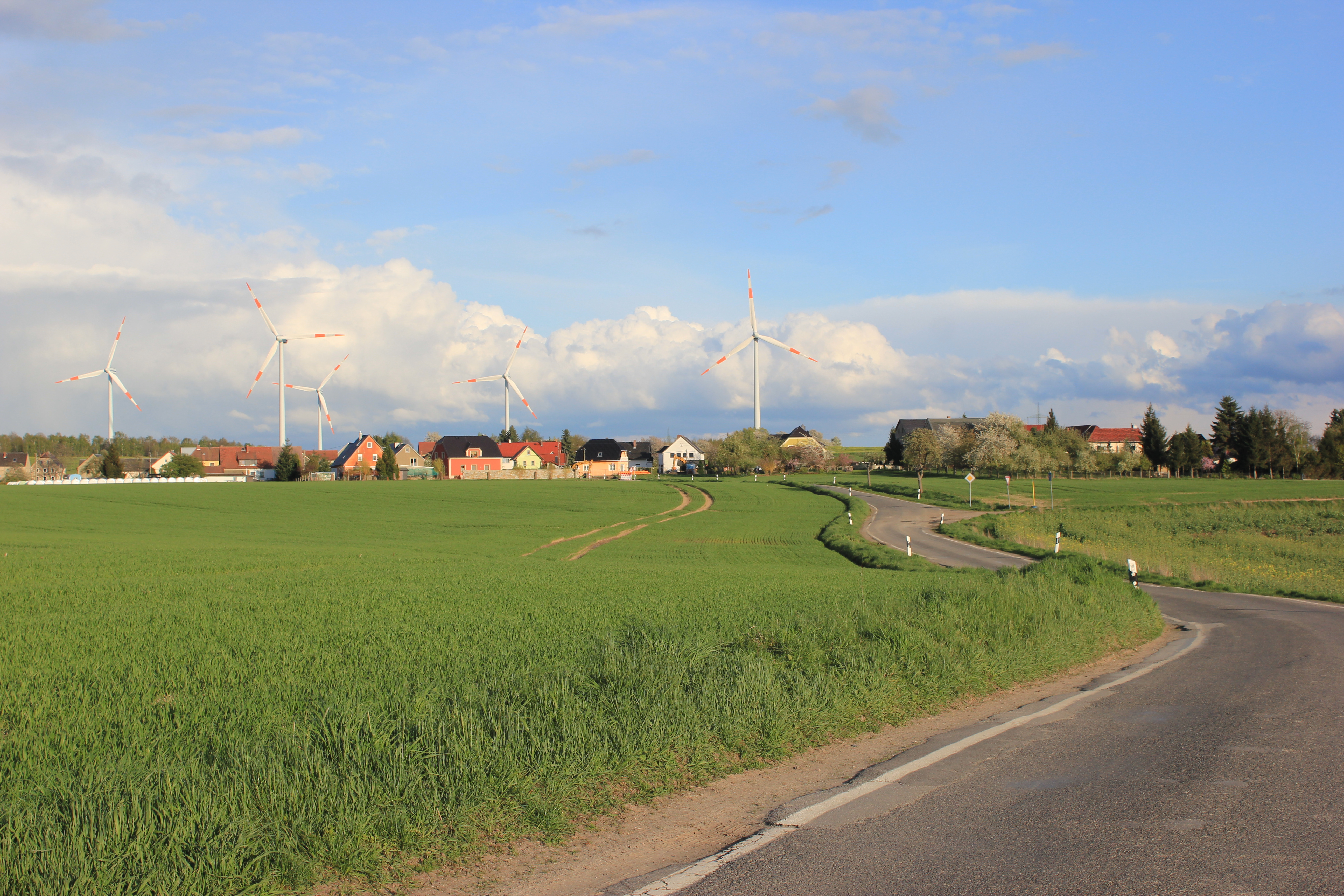 Hornjoserbsce: Napohlad Hory pola Bóšic ze zapada.